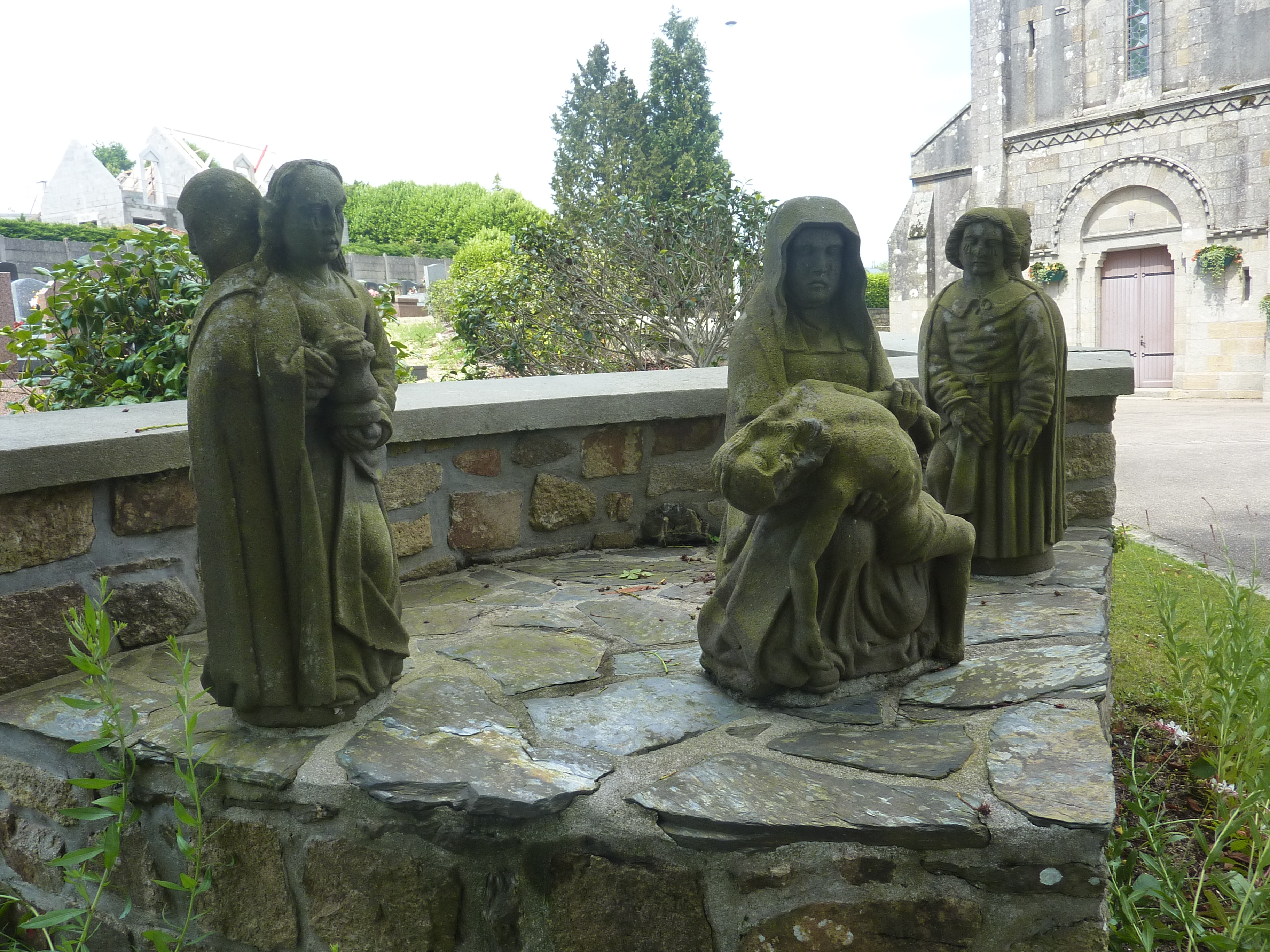 La Forest-Landerneau : les restes d'un ancien calvaire disparu